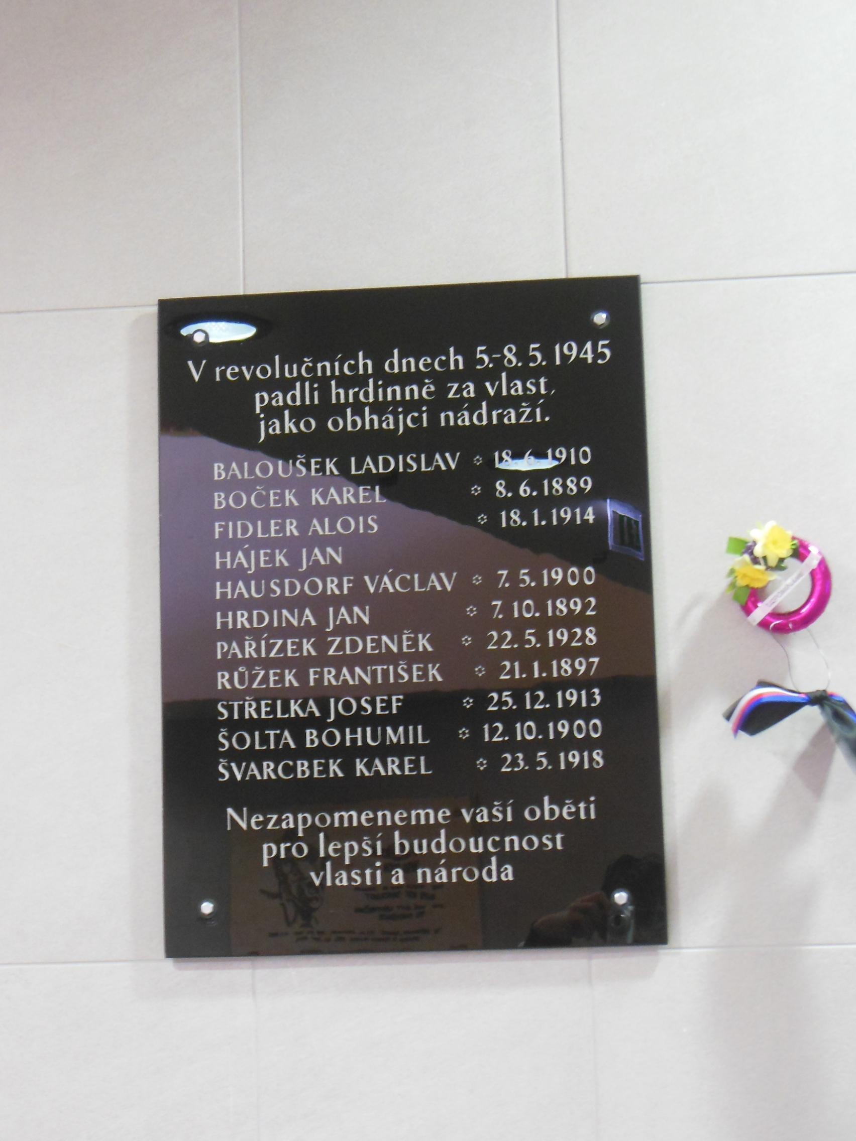 Praha-Vinohrady. Praha hlavní nádraží, pamětní deska padlých v revolučních dnech v podchodu pod Fantovou kavárnou.